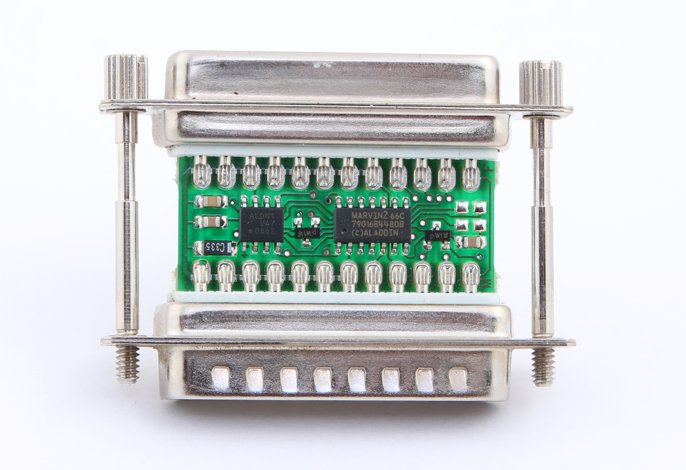 Внешний вид HASP ключа для LPT порта. Видна маркировка микросхем - специально произведенных фирмой alladin.